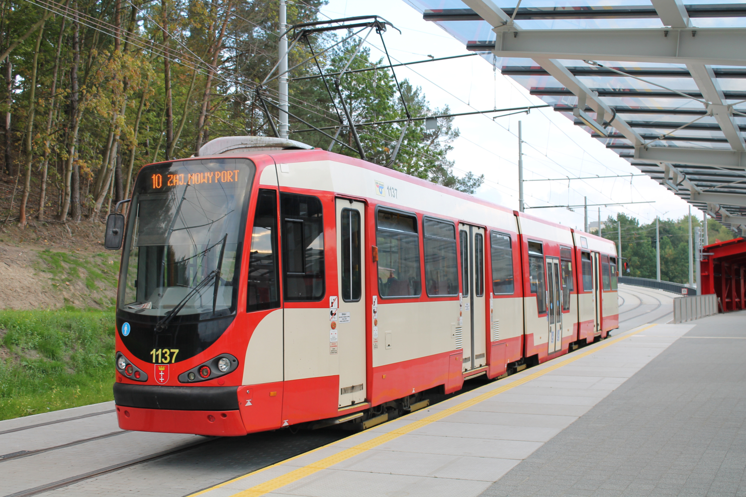 Tramwaj Moderus Beta MF 01 na przystanku kolejowym Gdańsk Brętowo. The making of this document was supported by Wikimedia Polska Association, within Wikigrant no. WG 2015-34. English | polski | +/−